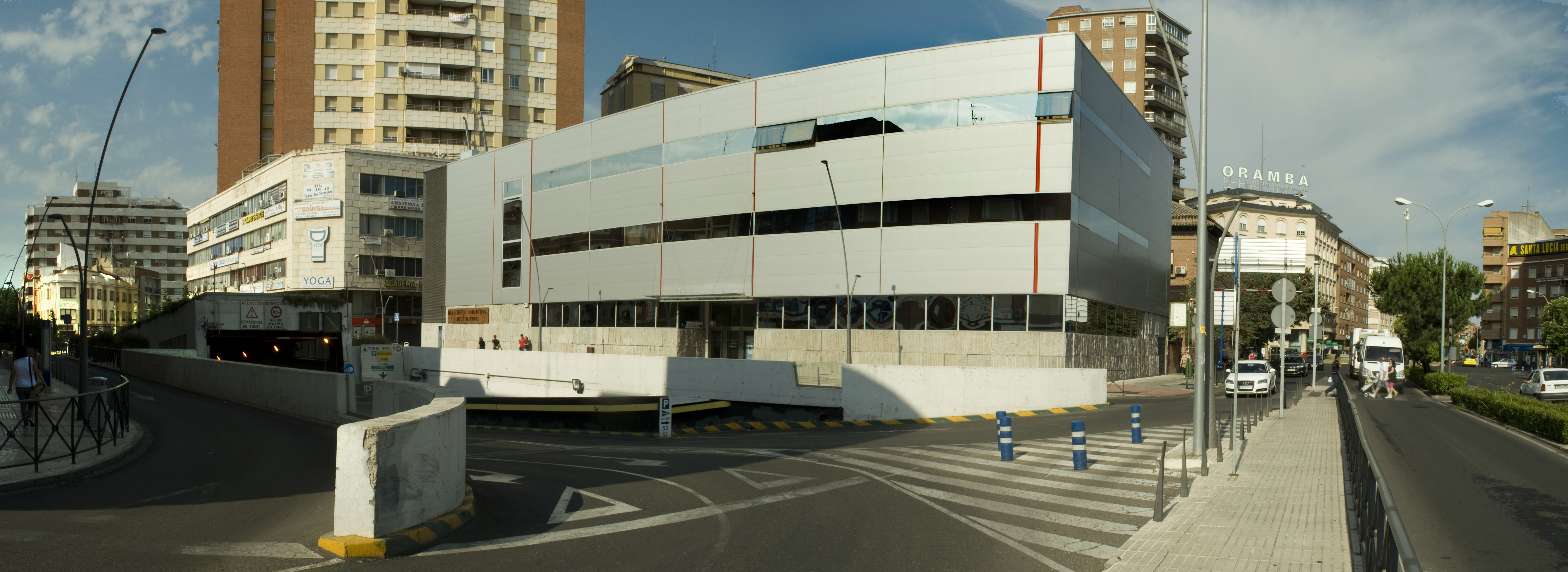 Vista panorámica con el edificio de la biblioteca pública municipal José Hierro de Talavera de la Reina